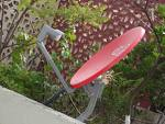 antena de dish mexico